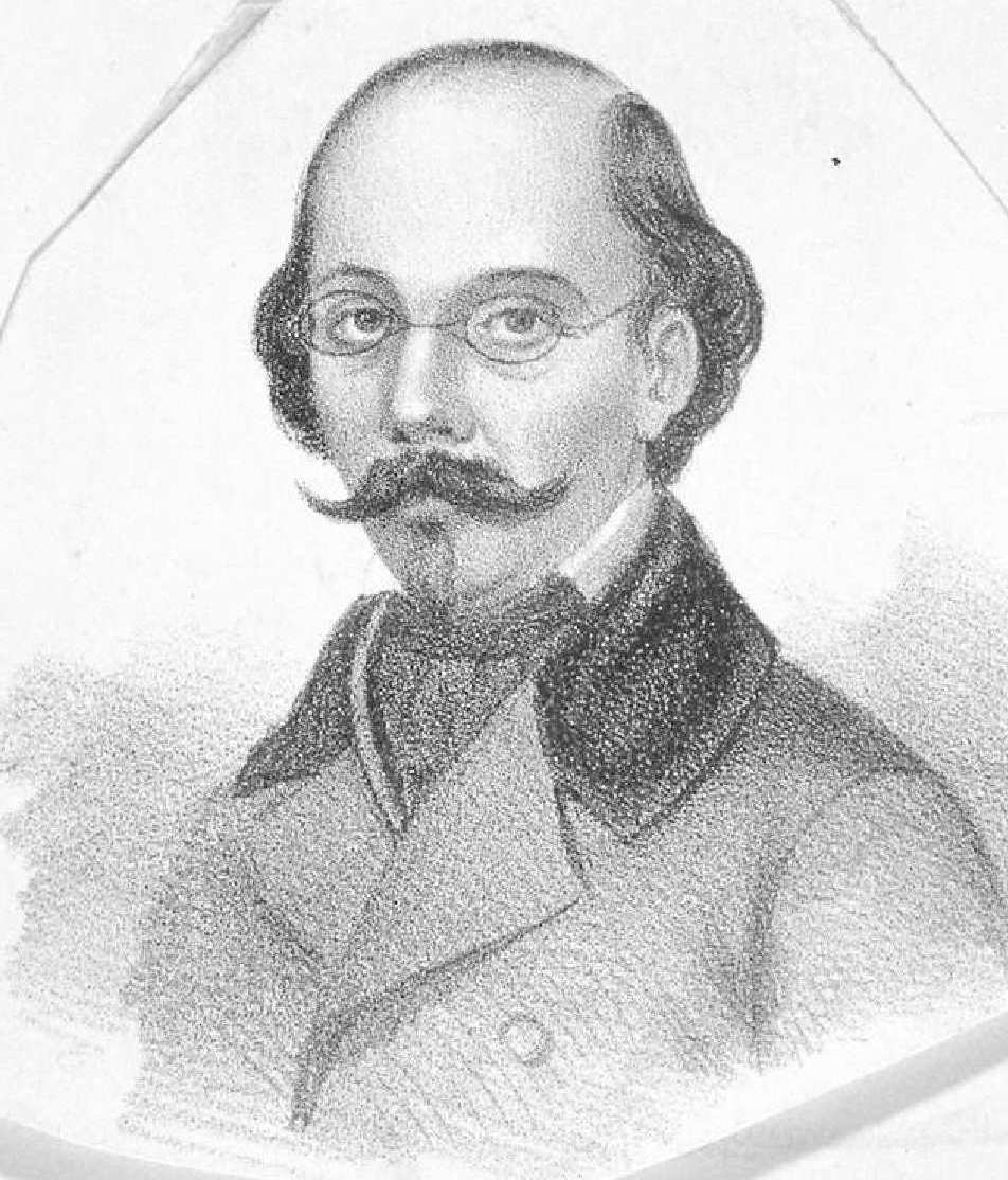 Ildefonso Antonio Bermejo, litografía de Leopoldo López de Gonzalo. Biblioteca Nacional de España.